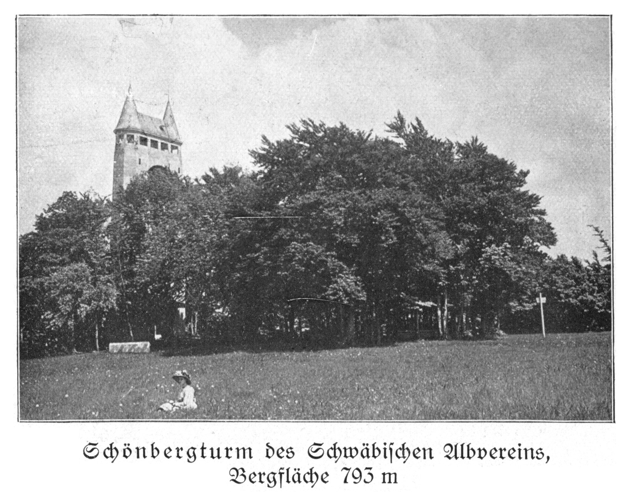 Schönbergturm des Schwäbischen Albvereins. Bergfläche 793 m.